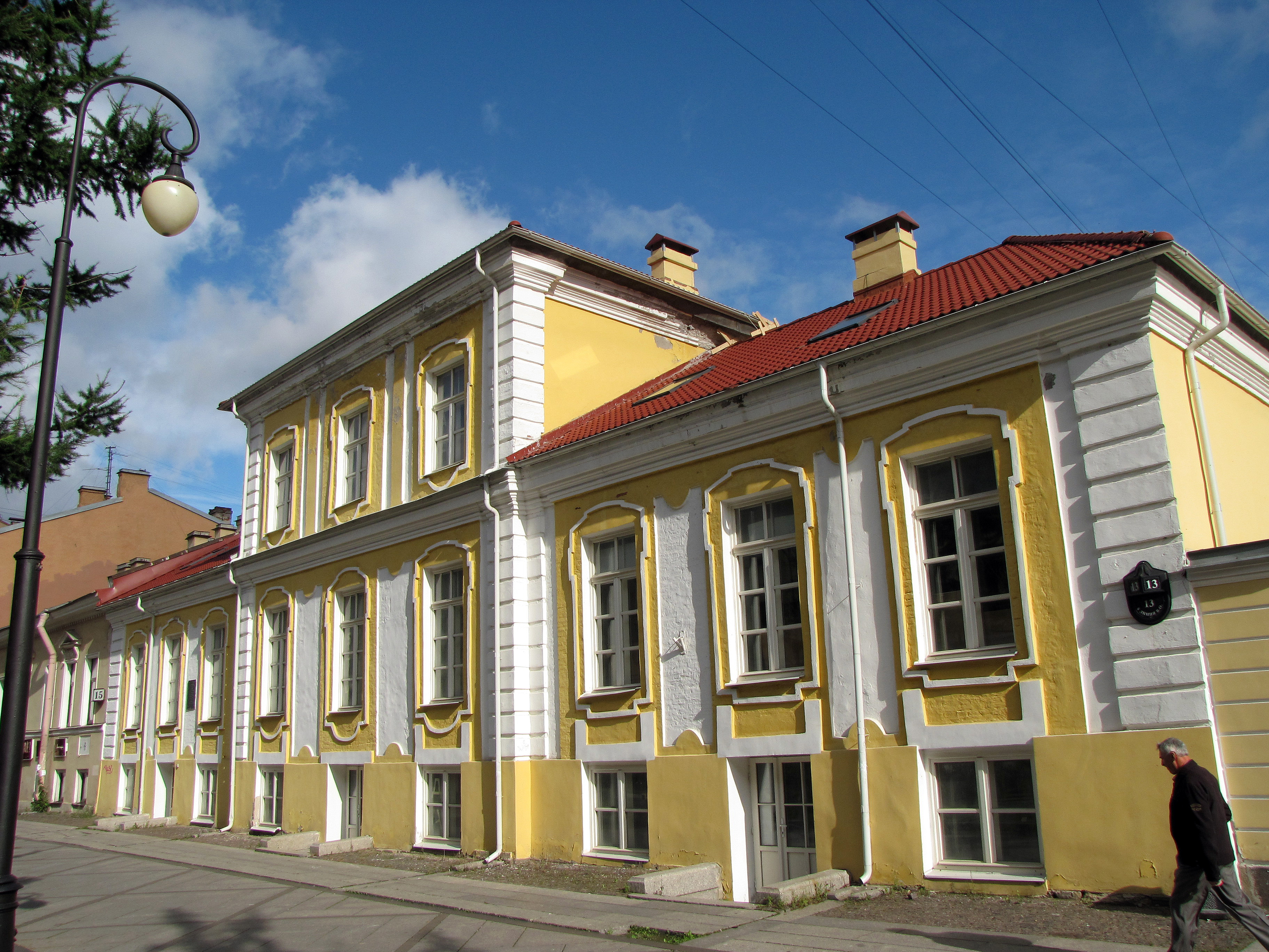 Дом Троекурова является уникальным строением для Петербурга. Ведь данный дом – образцовый проект дома «для именитых» - один из немногих сохранившихся с времён Петра Великого. По этому зданию можно судить, как выглядели улицы Петербурга в середине ХVIII века, застроенные «образцовыми домами». По мнению некоторых экспертов, дом Троекурова – это вторая каменная постройка Санкт-Петербурга. Первой является Меншиковский дворец.